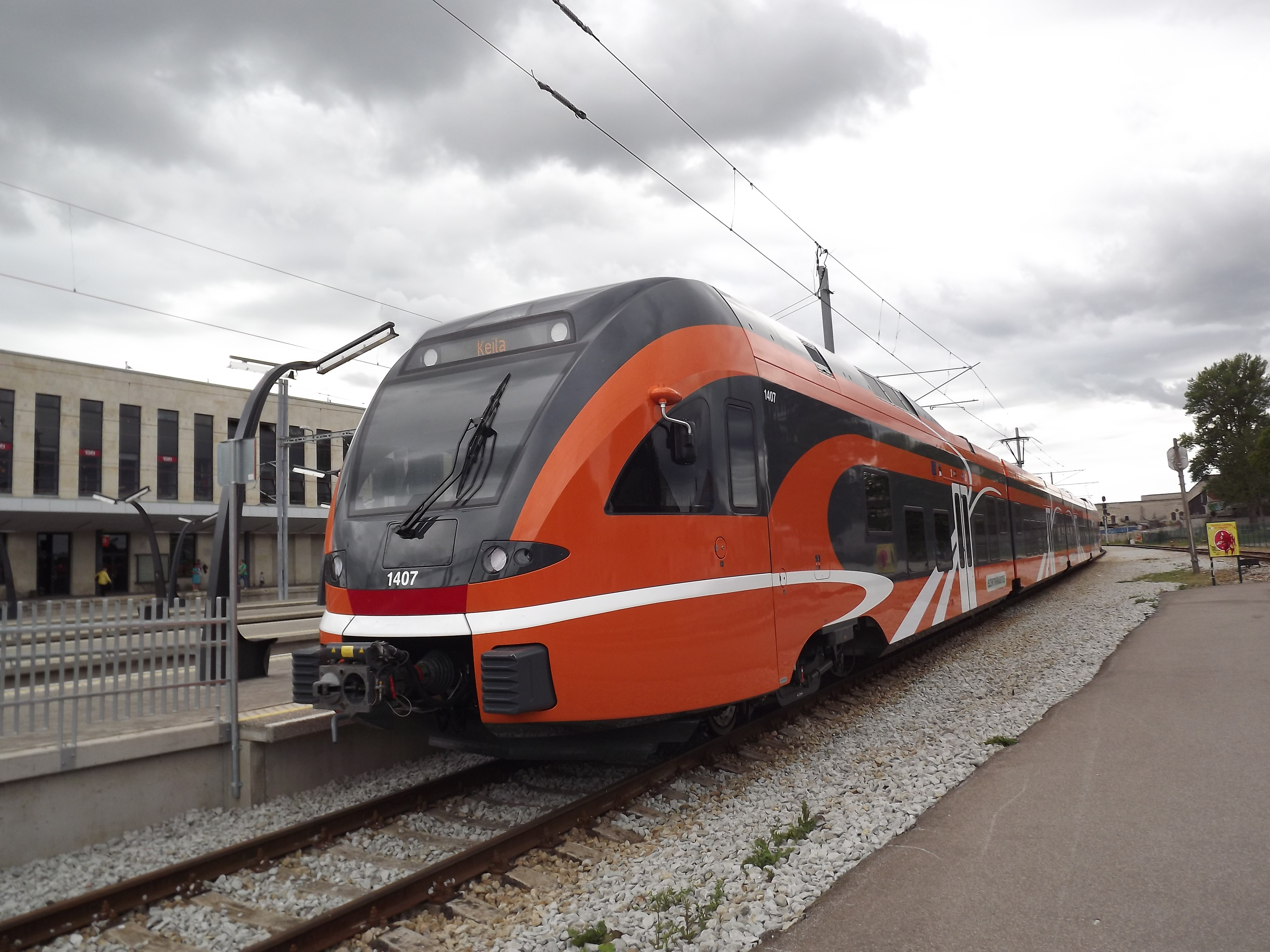 Stadler FLIRT EMU Balti jaamas